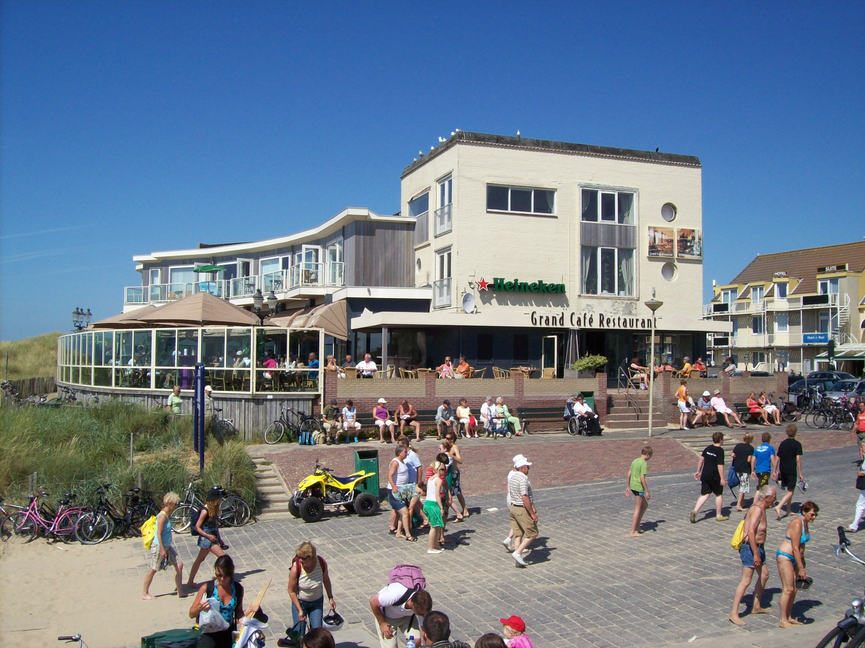 Het Lido - Grand Cafe Restaurant Van Speijk, Westeinde 1, Egmond aan Zee (locatie in de VARA-serie "Vuurzee")